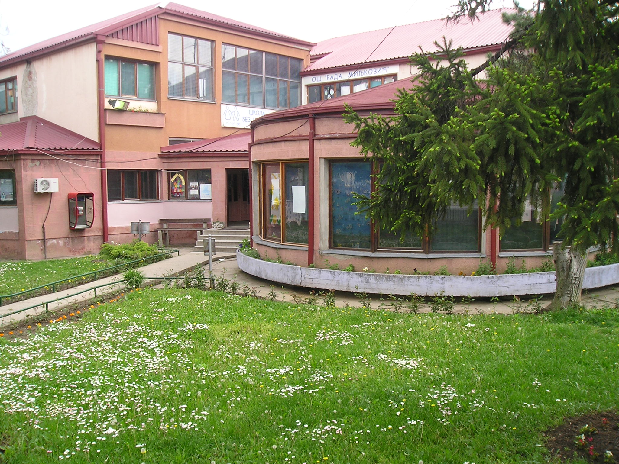 Srpski (latinica): Prednja strana škole